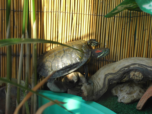 Macho de Tortuga de Florida o de Orejas Rojas "Pseudemys scripta" subesp. "elegans" en cautividad.